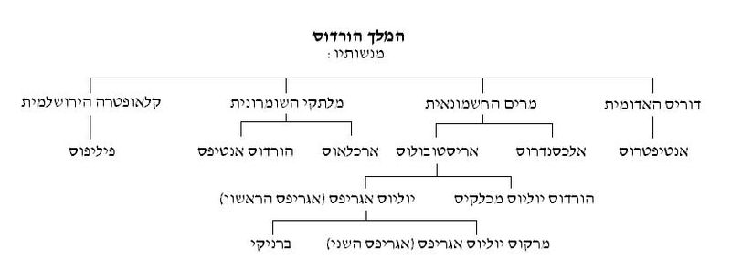 Dynasty of herod